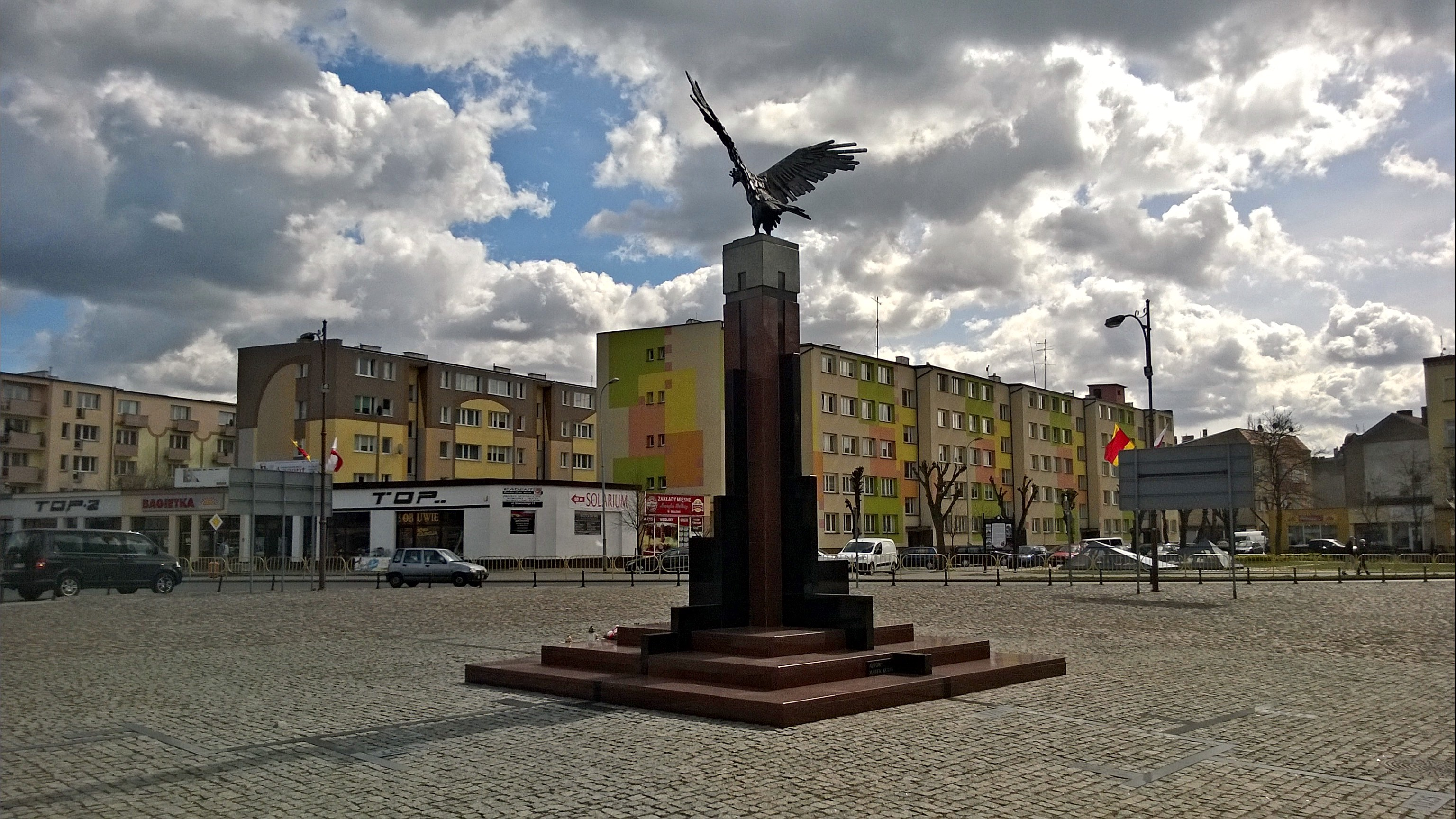 Dębno